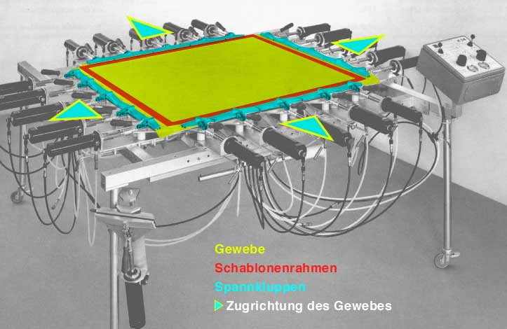 Siebspanngeraet